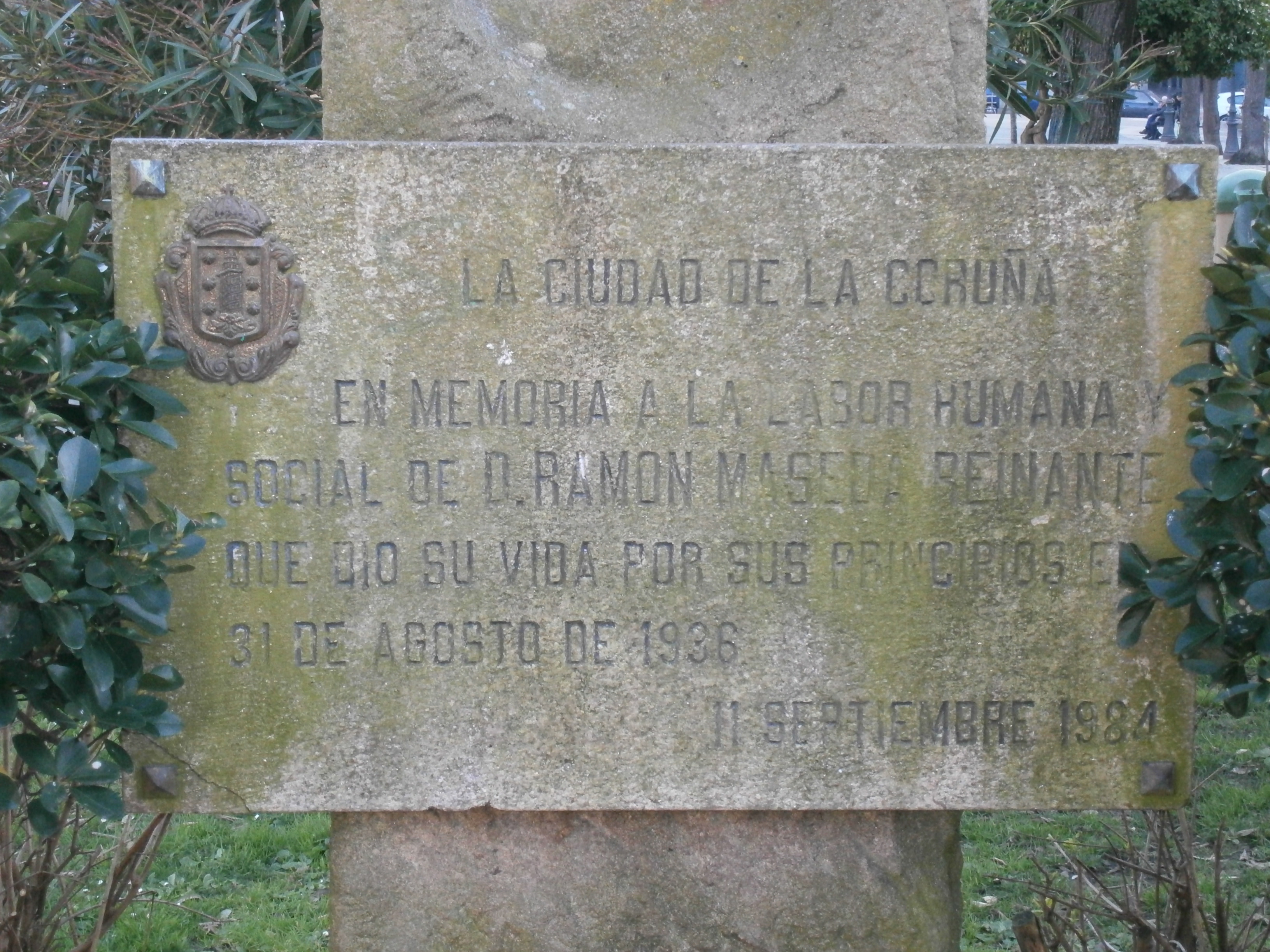 Monumento a Ramón Maseda Reinante no Campo de Marte da Coruña